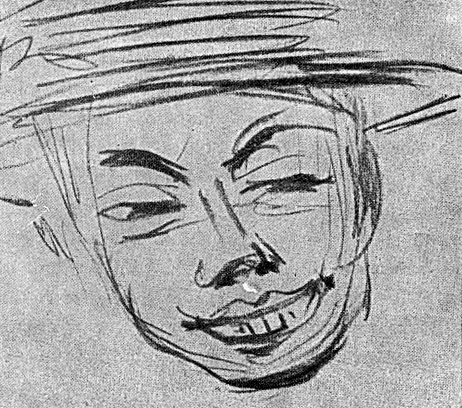 Käthe Kollwitz, Zeichnung von Heinrich Zille (drawing by Zille)